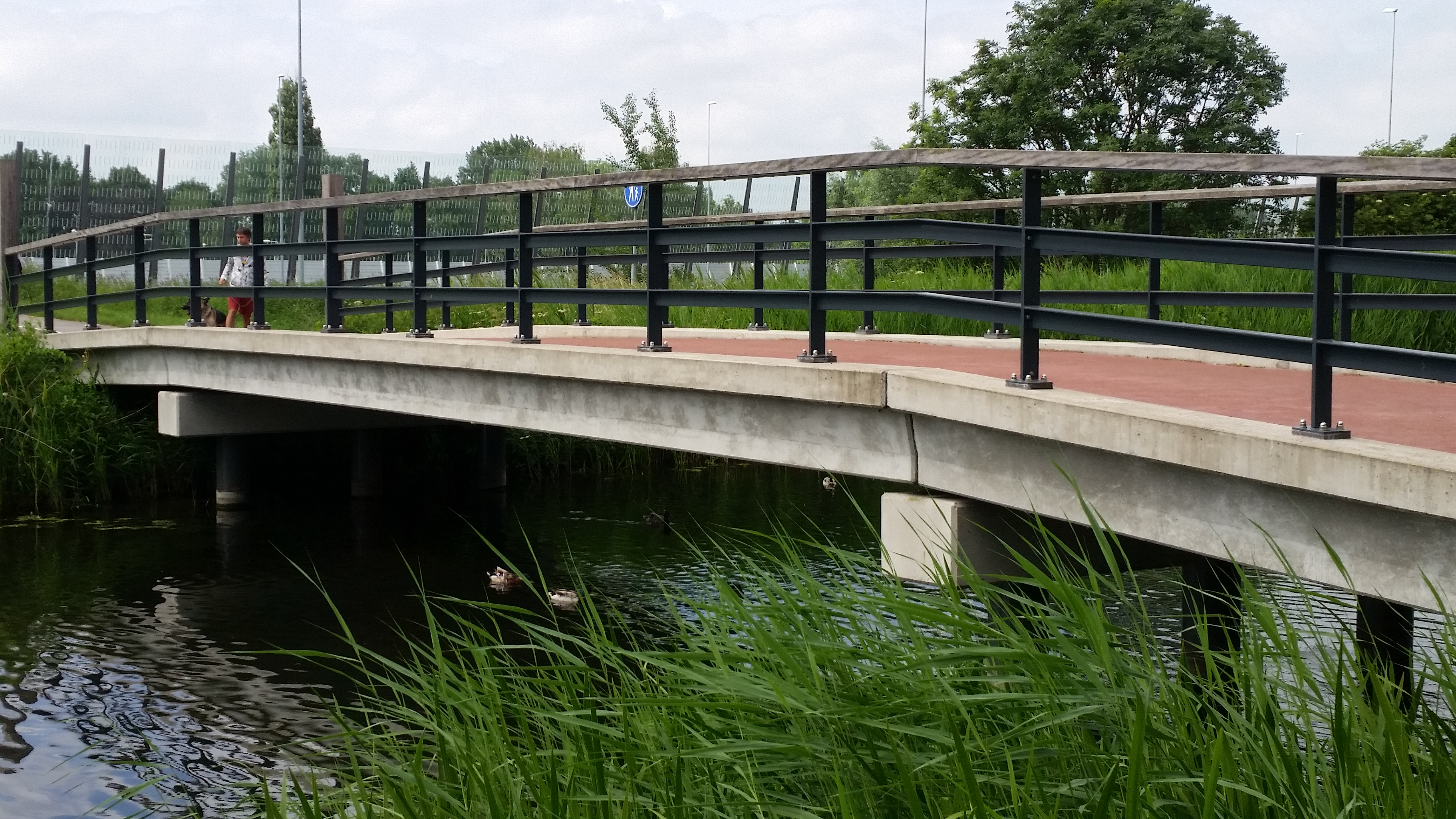 Voet/fietsbrug tussen de Radioweg te Amsterdam en Oranjelaan Diemen; gemeente Diemen